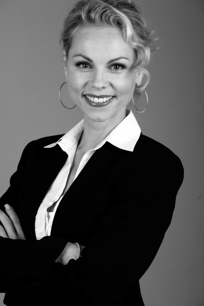 Financial journalist Patricia Szarvas